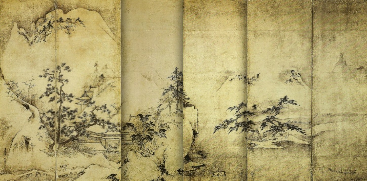 Paysage des quatre saisons (paravent 2 - de deux paravents jumeaux) (152x310 centimètres) est une encre sur papier peinte par le peintre japonais du XVe siècle, Tenshō Shūbun. Collection Maeda, Ikutokukai, Tokyo.